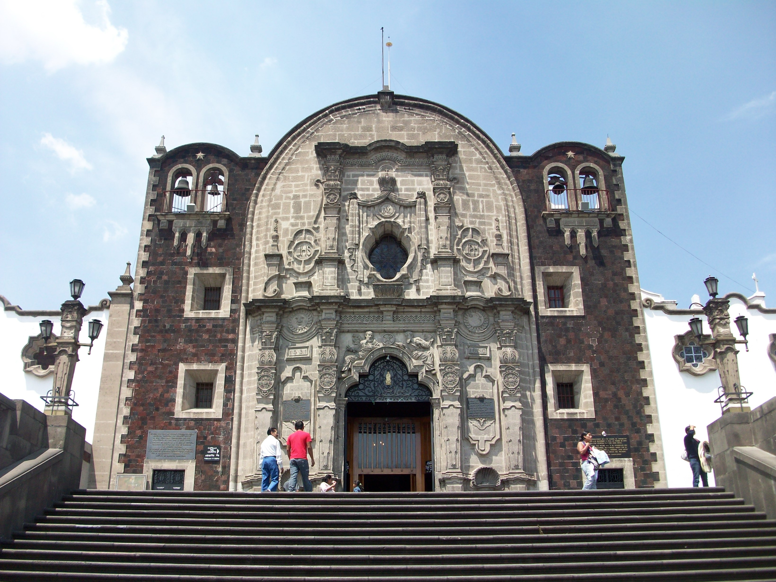 Conjunto Villa de Guadalupe